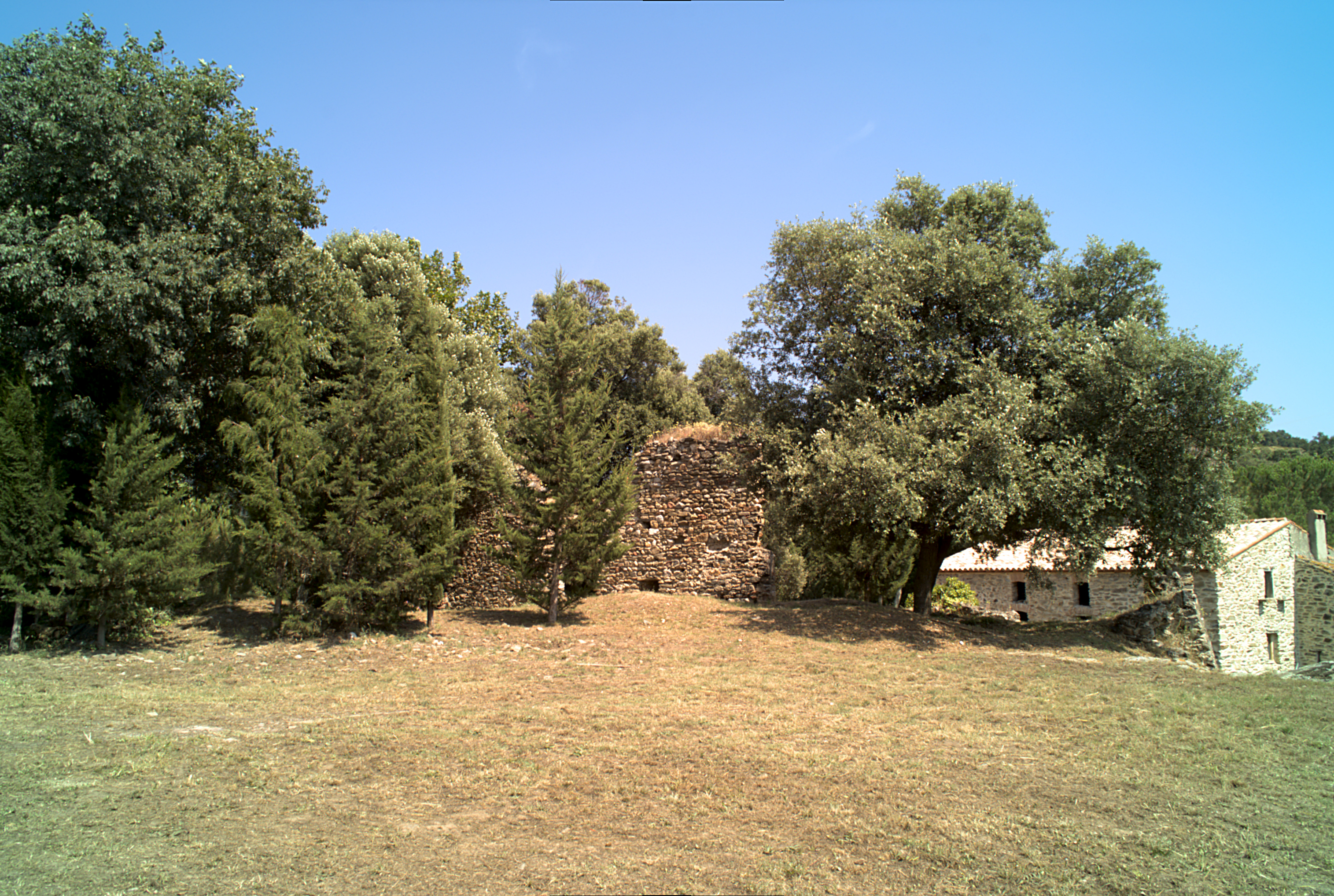 Ruines près de l'Église Sainte-Marie de La Cluse Haute, Les Cluses (Pyrénées-Orientales, Languedoc-Roussillon, France)